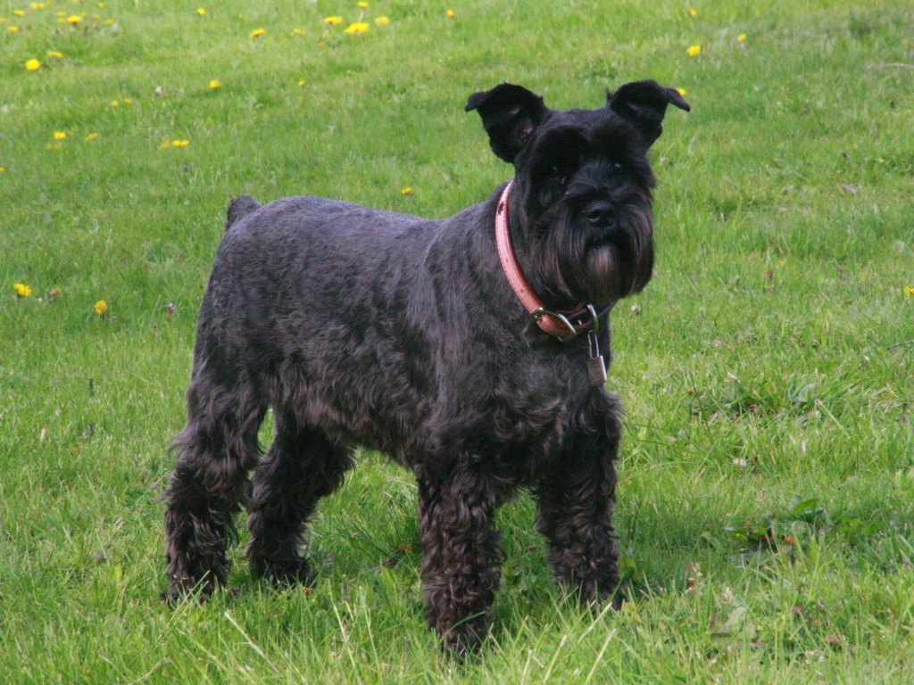 Black Female LAURA FRIGAU (28.10.1856 - 22.07.2012)